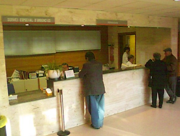 Recepción de un Centro de Atención Primaria. Autor fotografía: Pixel